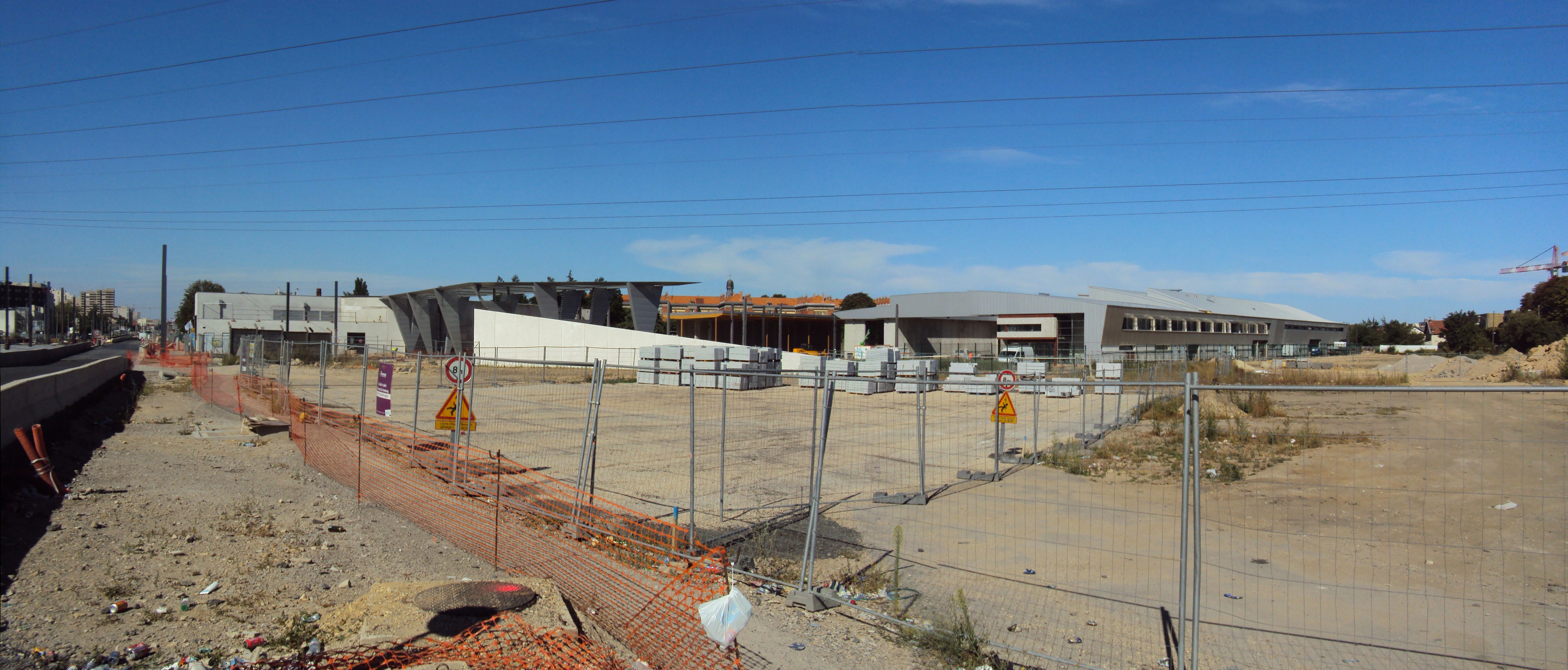 Les travaux du T7 au Nord de Belle épine. Vue des futurs atelier d'entretien